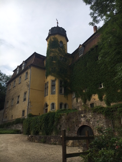 Schloss